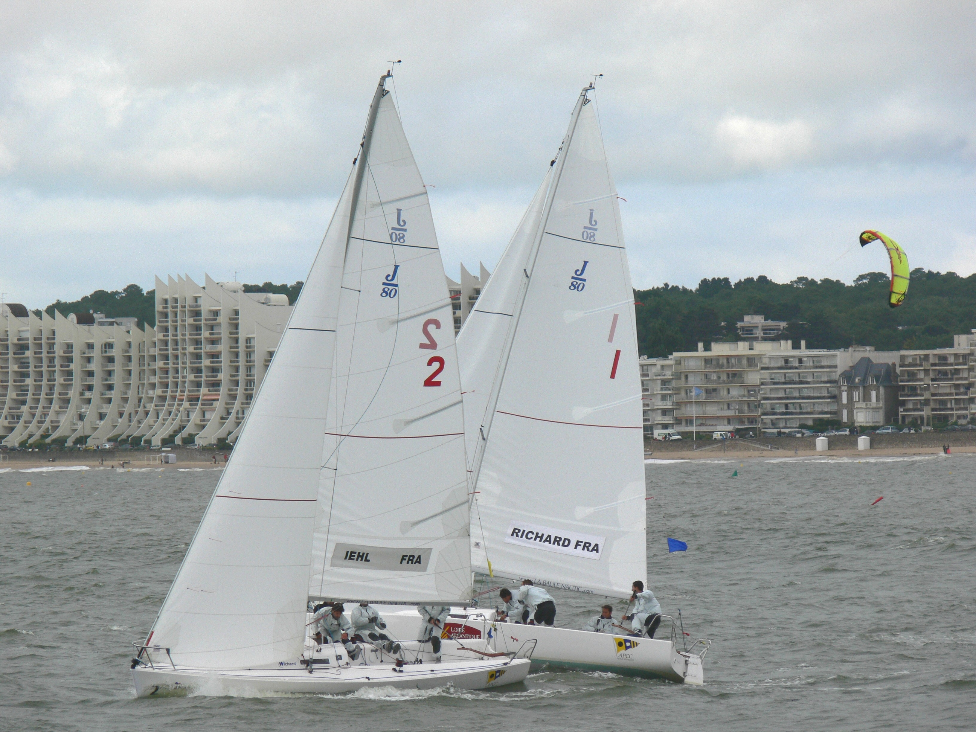 Demi-finale des championnats de France de match racing 2008